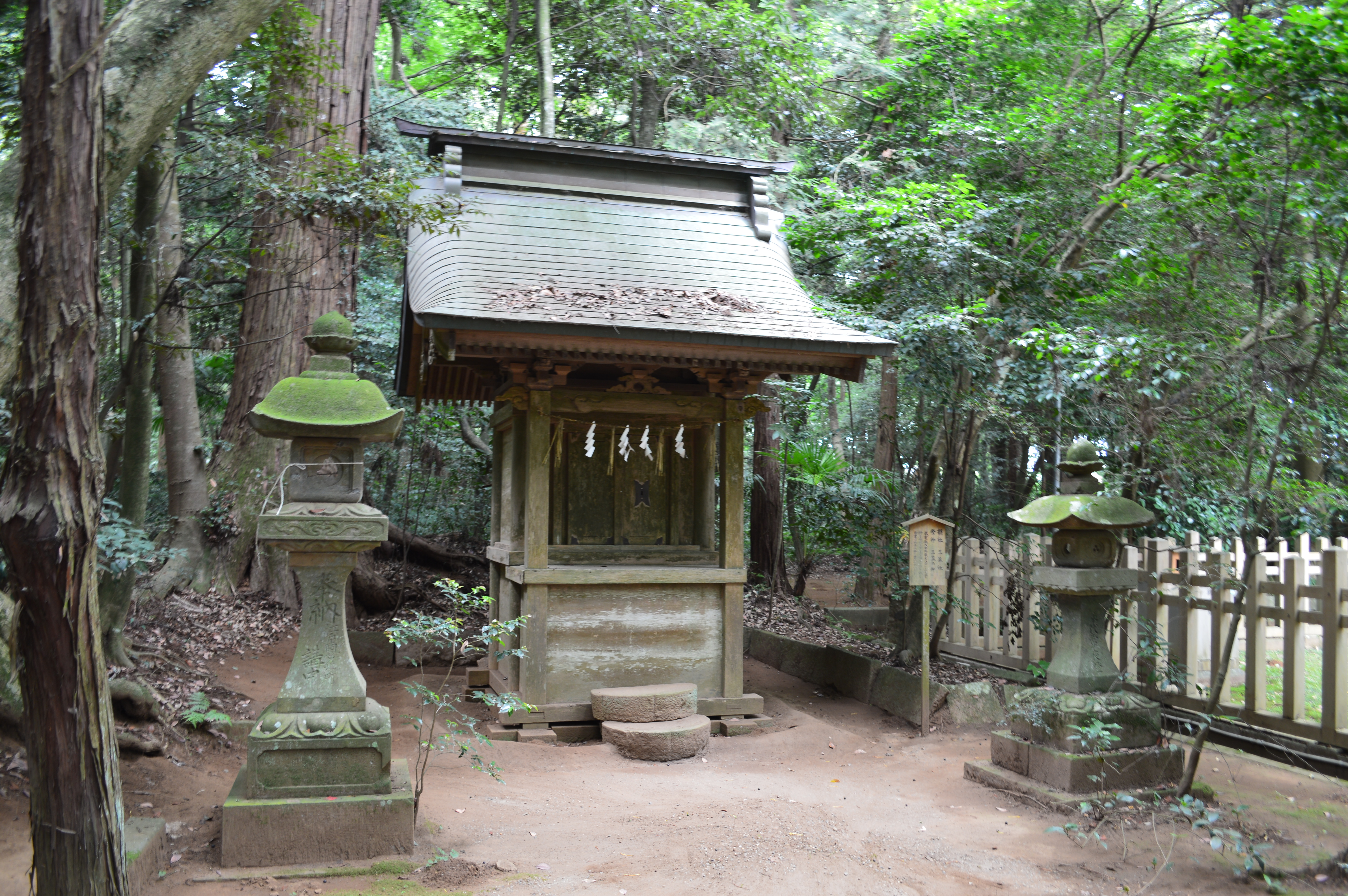 鹿島神宮境内摂社 三笠神社